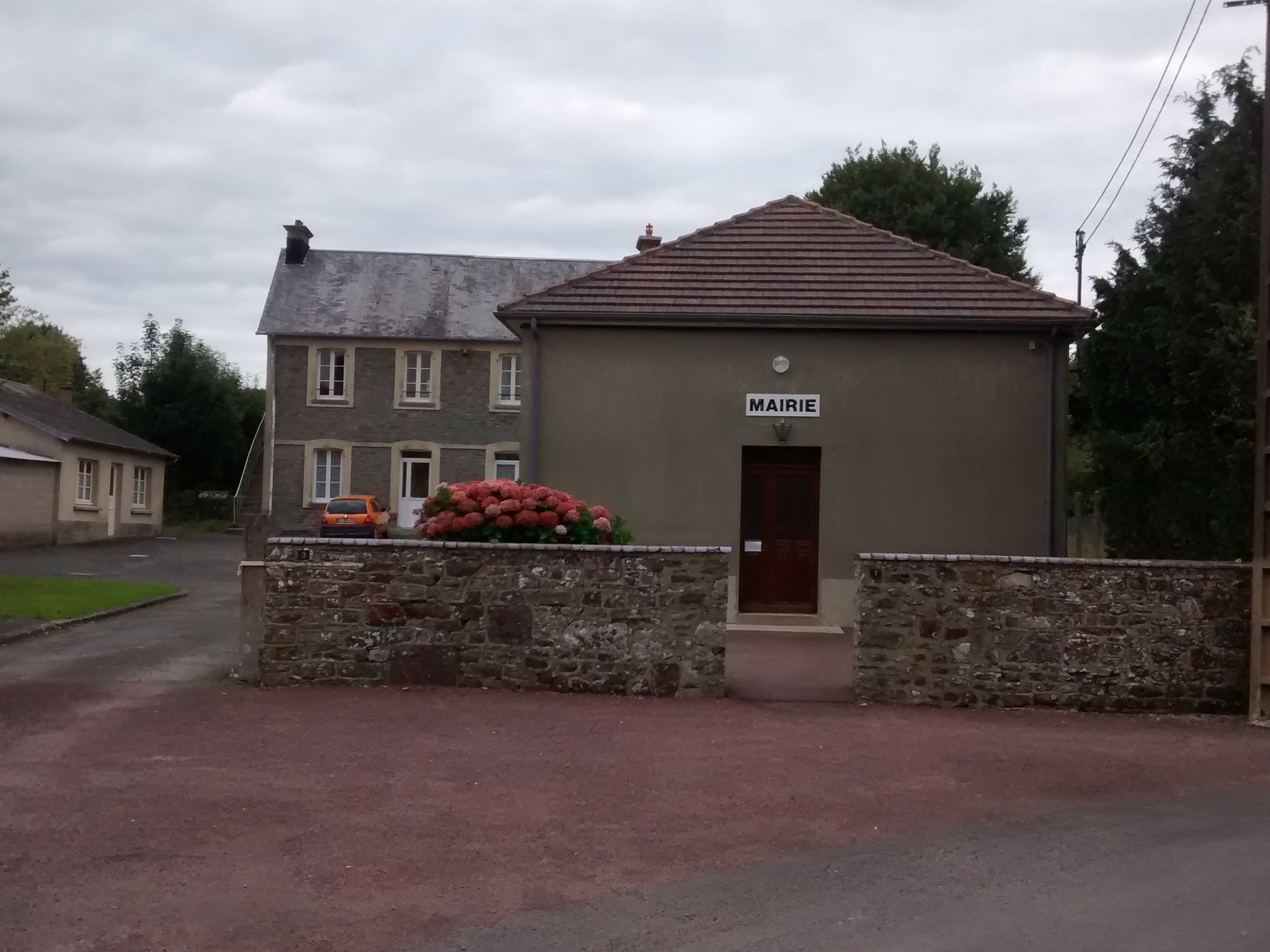 Le Mesnil-Herman,Manche